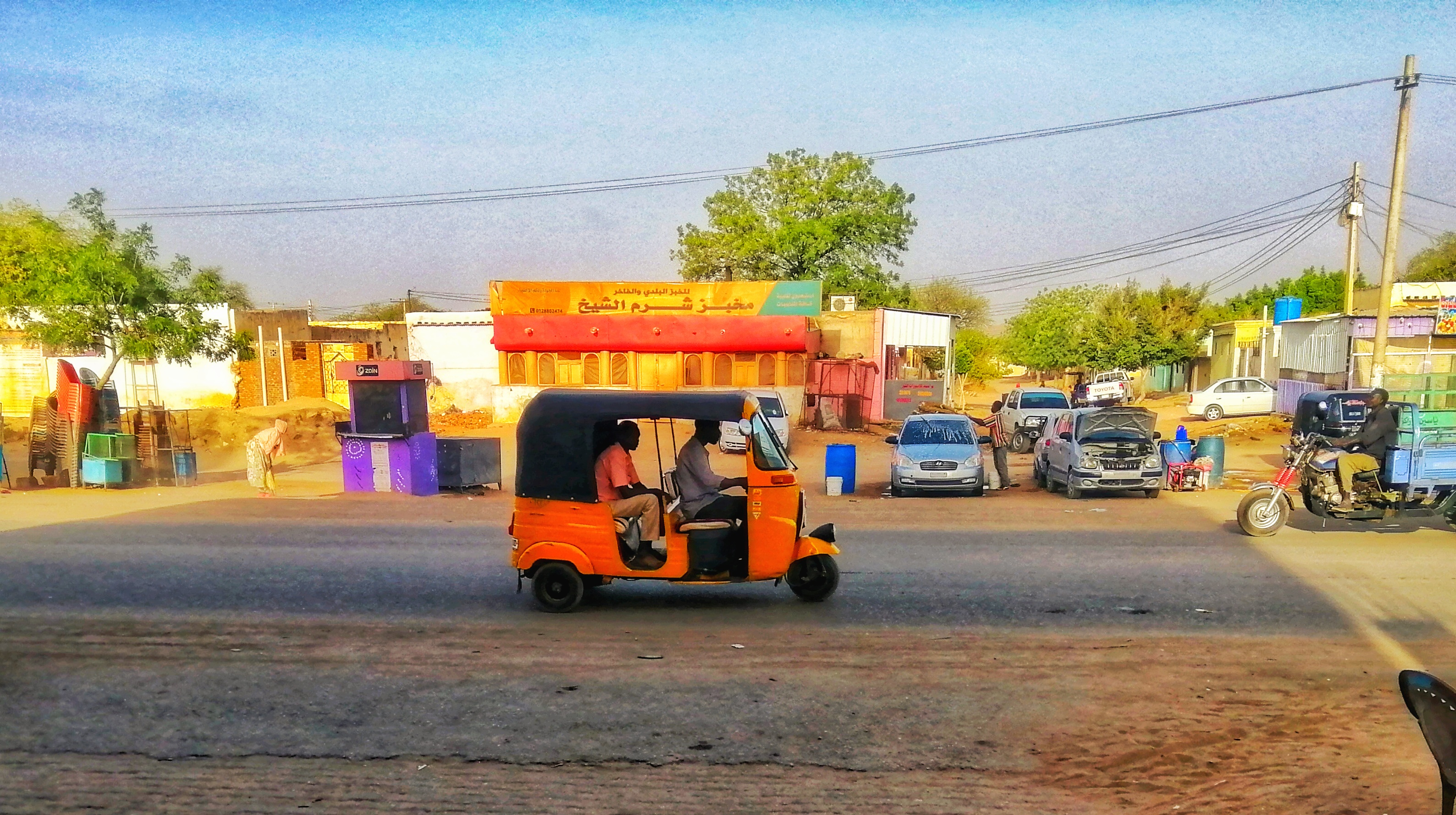 ركشات الكنغو This is an image with the theme "Africa on the Move or Transport" from: Sudan